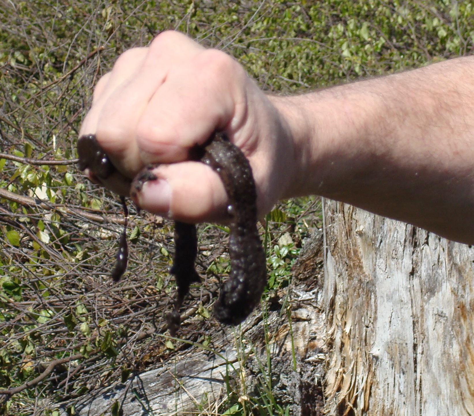 Torv av humufieringsgrad 8